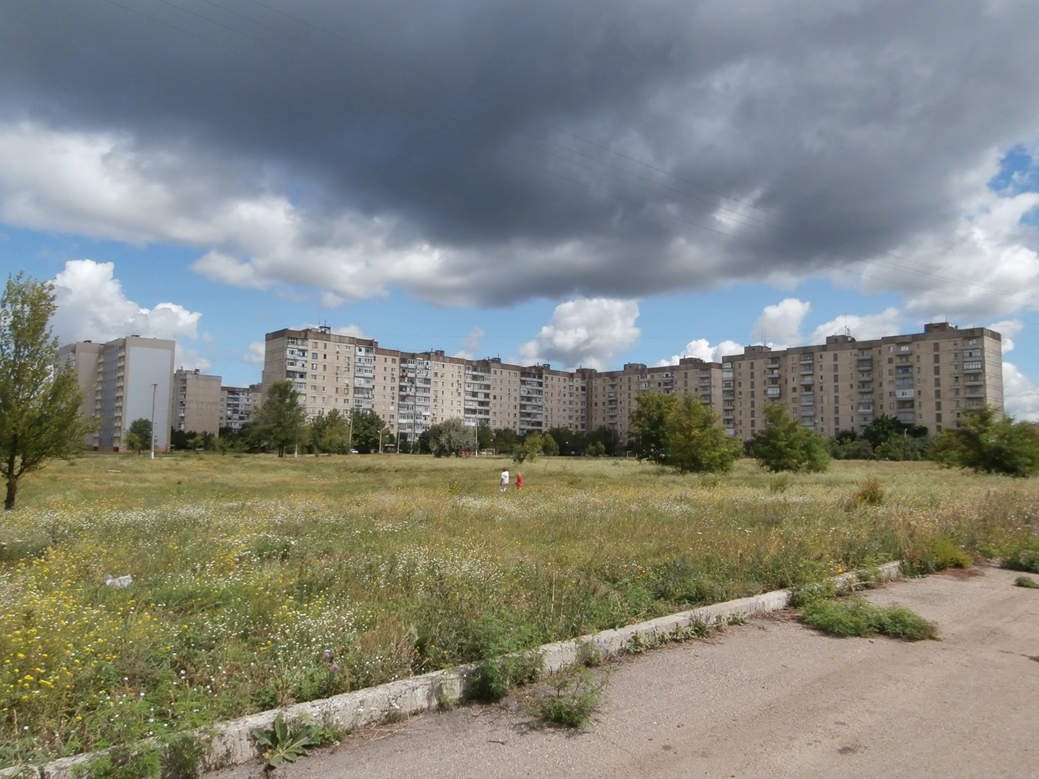 Schowti Wody- Wohnhäuser im Westen